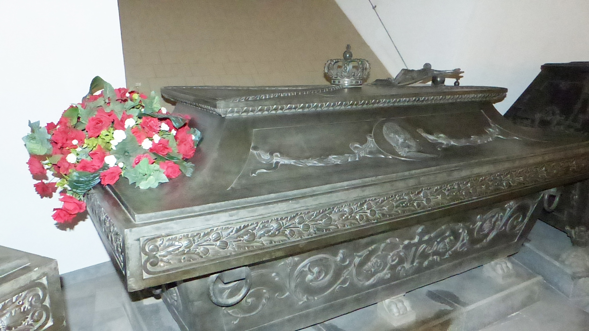 Sarkophag für Friedrich August I. in der Stiftergruft der Wettiner Gruft in der Katholischen Hofkirche, Dresden